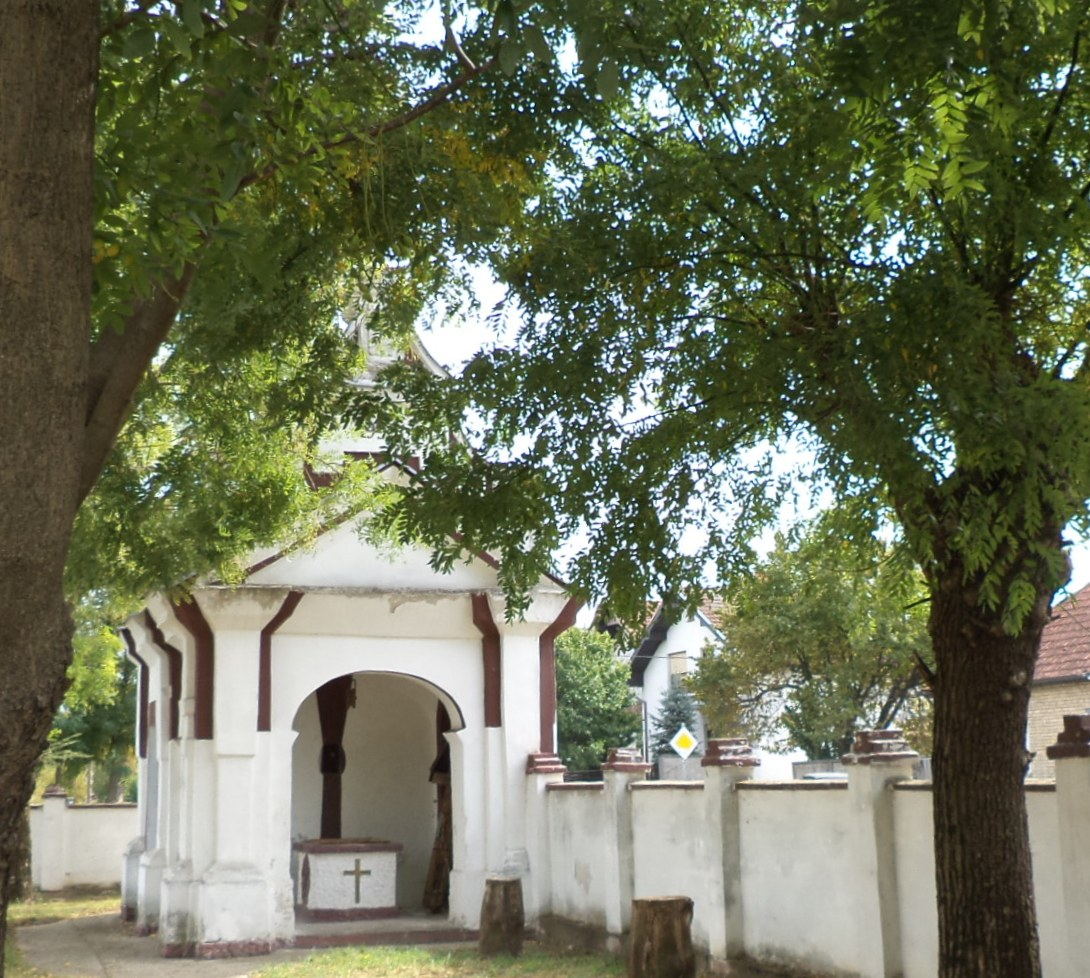 Капела „Водица“ у Врбасу